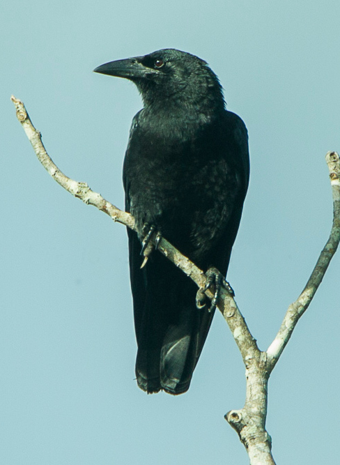 Cuban Crow - Zapata, Cuba